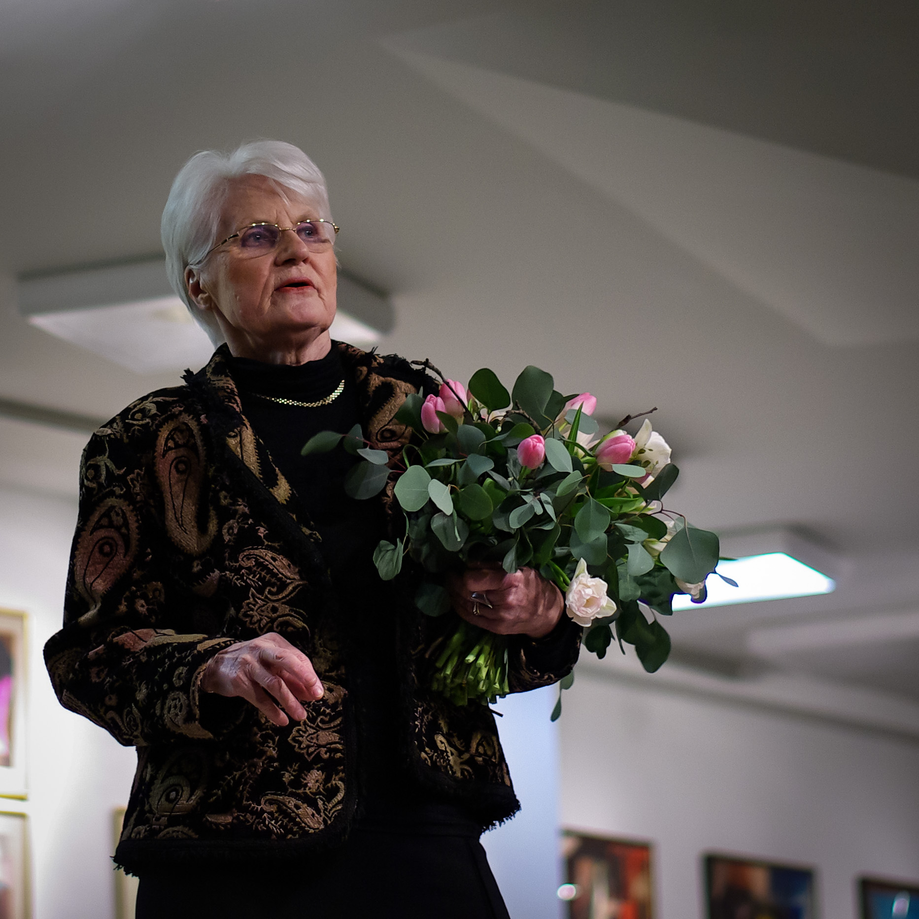 Džemma Skulme - gleznotāja, divdesmitā gadsimta latviešu glezniecības un kultūras dzīves simboliskā ikona.